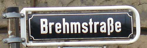 Straßenschild Brehmstraße in Düsseldorf, Deutschland.